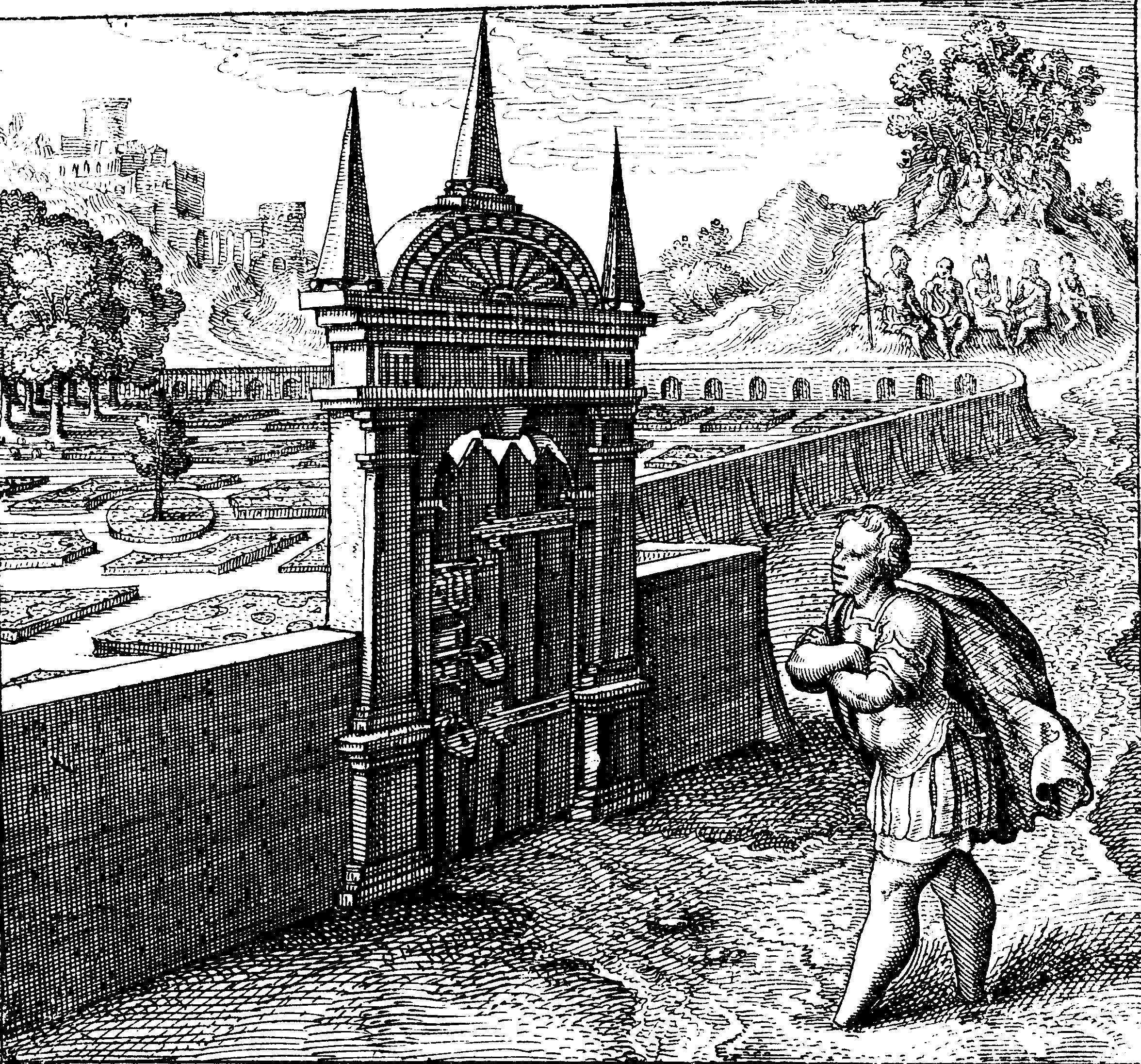 Kupferstich in Michael Maiers Buch 'Atalanta Fugiens'. Emblem XXVII. Ein Mann, der die Hände nicht regt und keine Füße hat, steht ratlos vor dem verschlossenen Rosengarten.